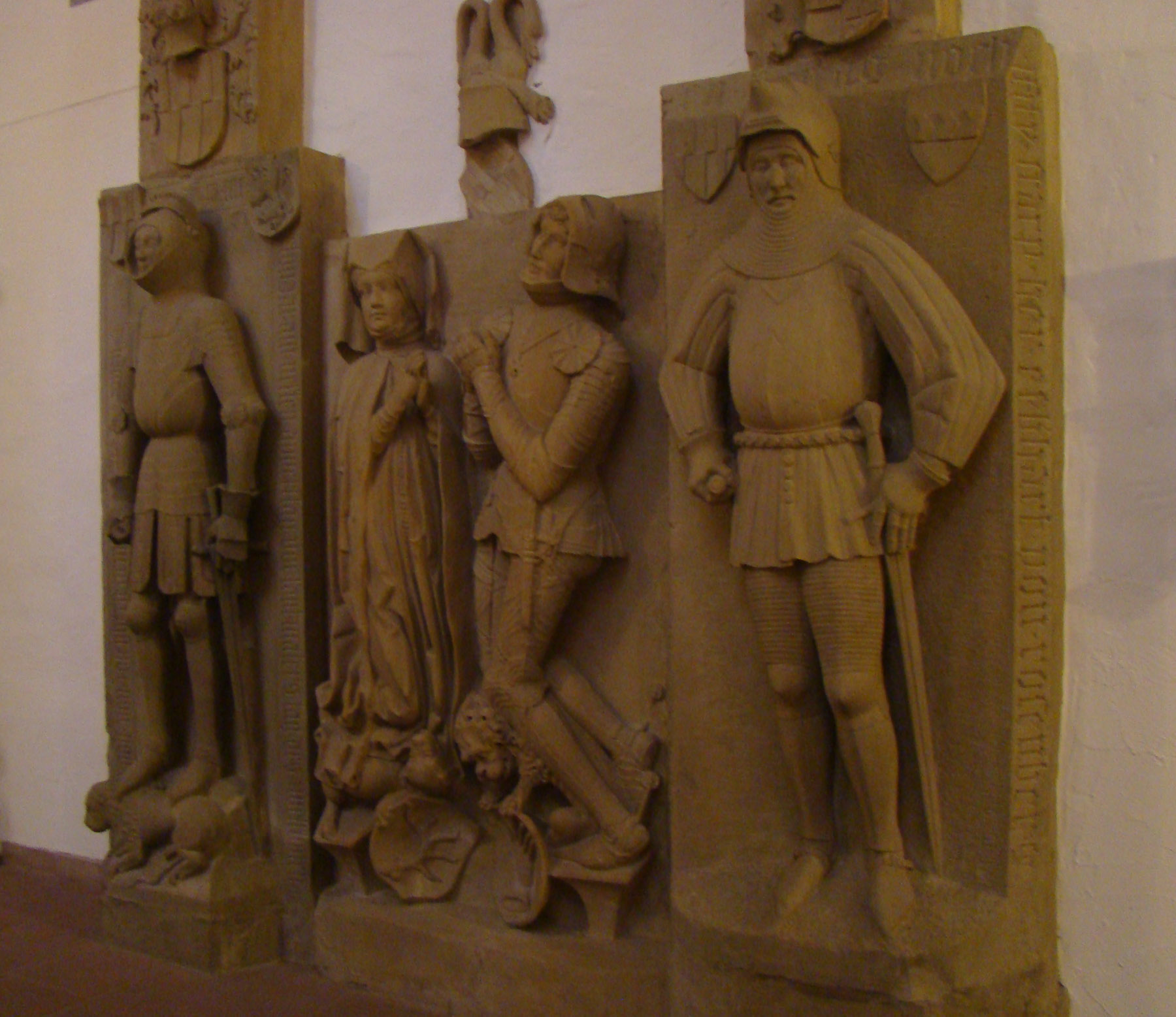 Boxberg-Wölchingen, Frankendom